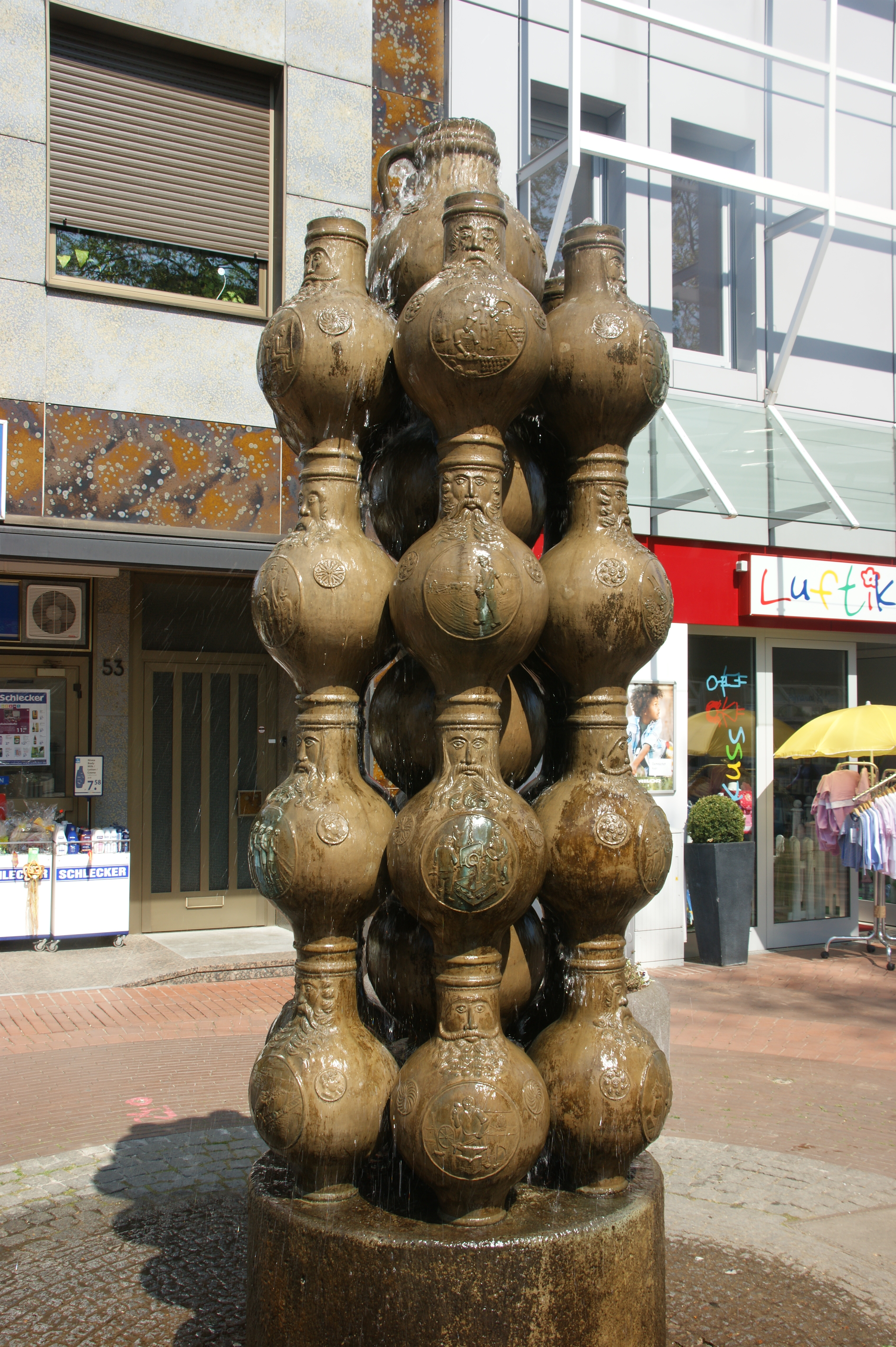 Bartmannsbrunnen aus 28 Bartmannskrügen in der Frechener Fußgängerzone, gestaltet von Olaf Höhnen